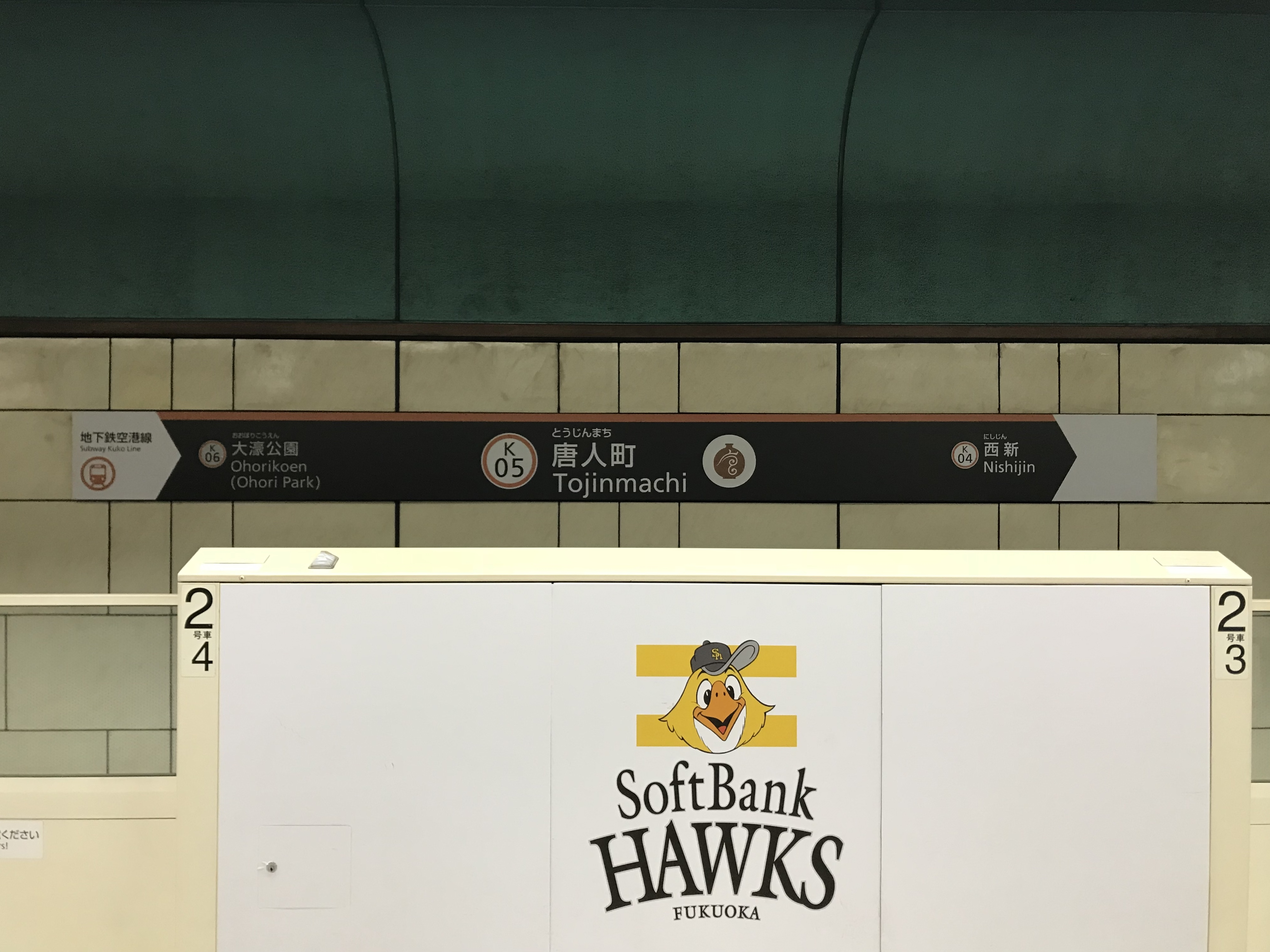 唐人町駅の駅名標。イラストは唐人の壺